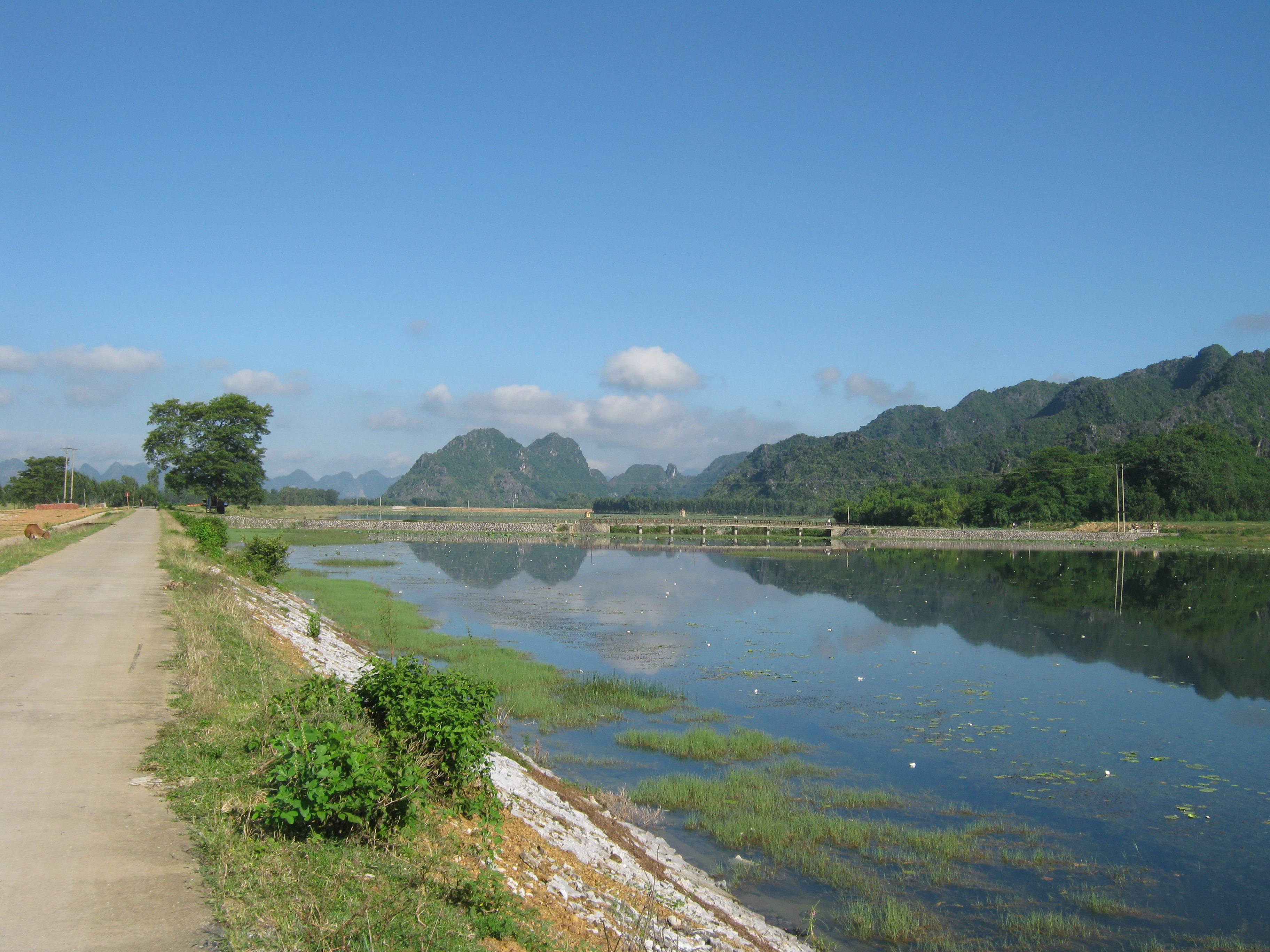 Khu di tích động Hoa Lư, châu Đại Hoàng, Ninh Bình